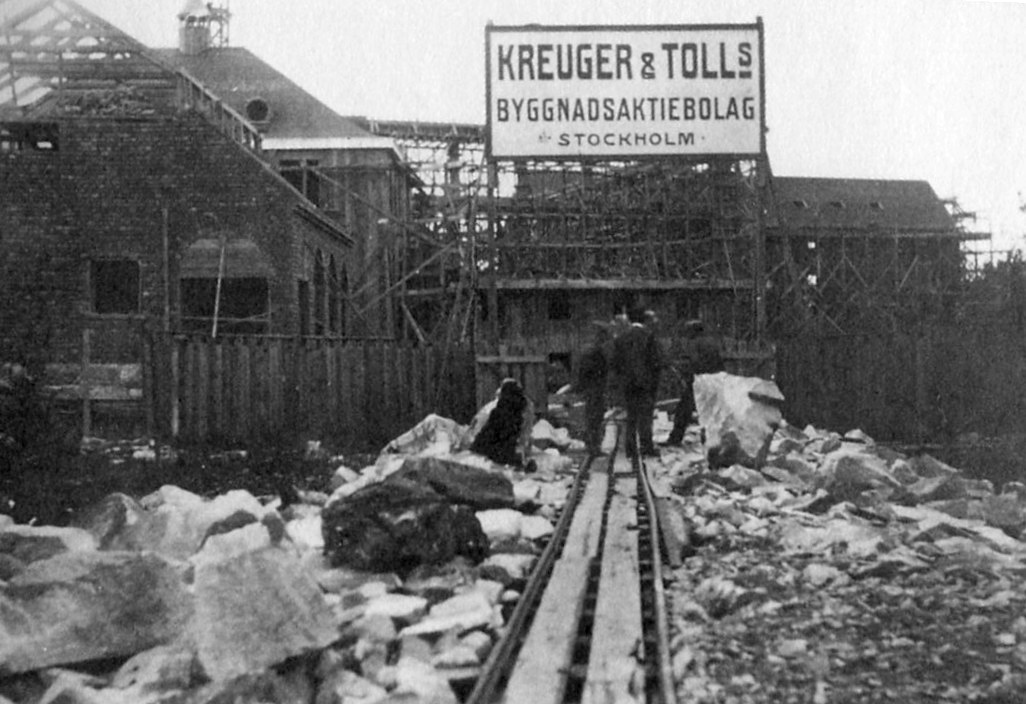 Kreuger & Toll:s byggskylt vid "Lilla ateljén" på Råsunda filmstad i Solna